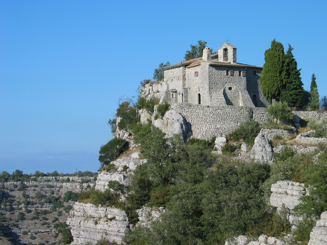 Ermitage St Eugène dans le bois de Païolive en Ardèche.